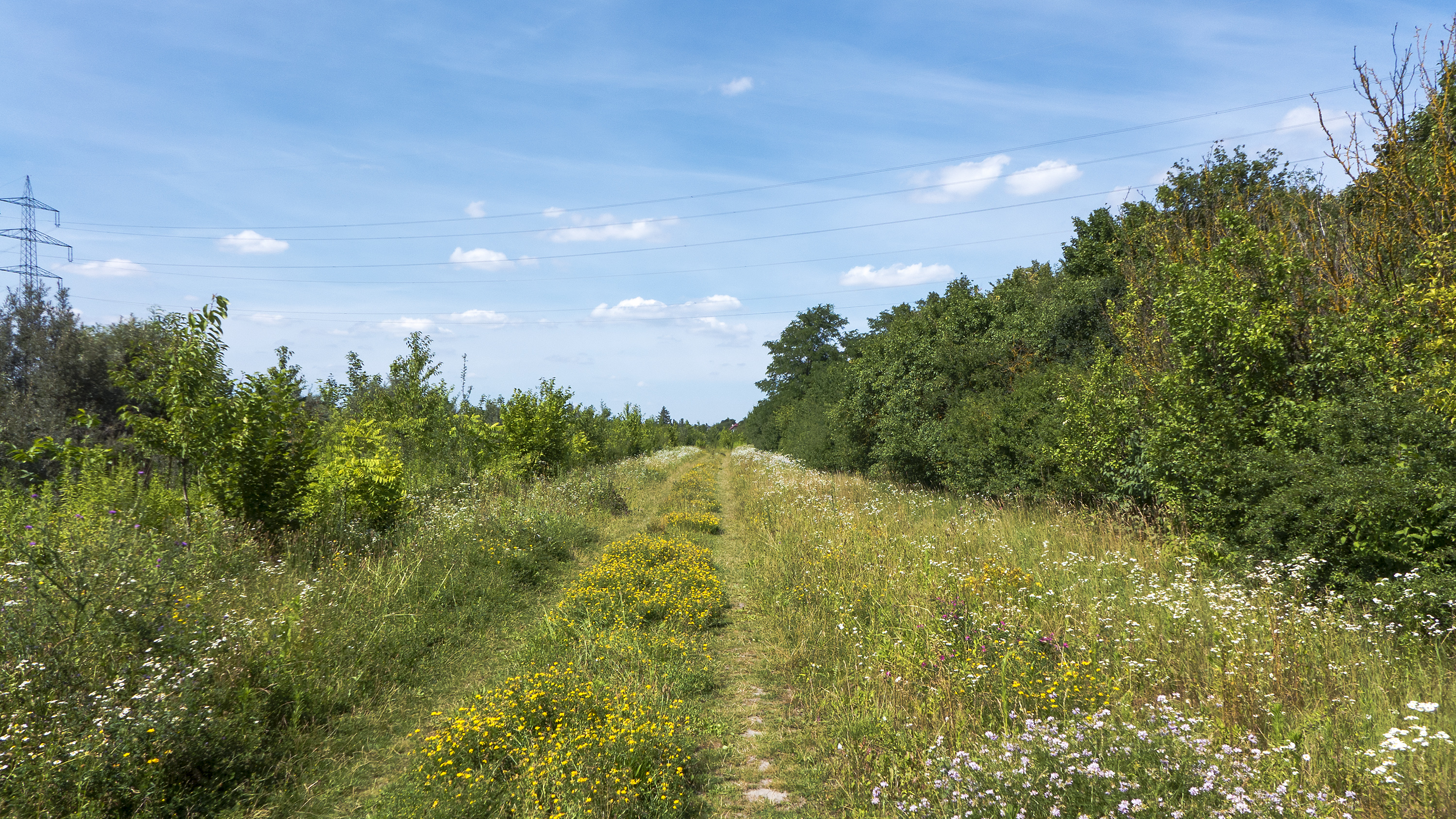 Norbert-Scheed-Wald in Wien 22